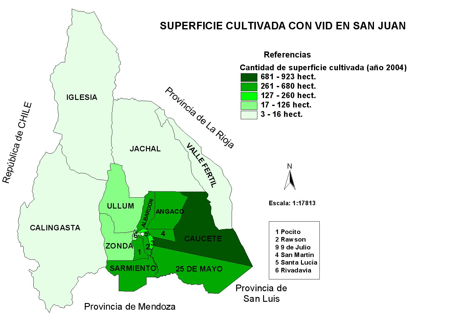 Mapa de la superficie cultivada con vid en la provincia de San Juan, argentina